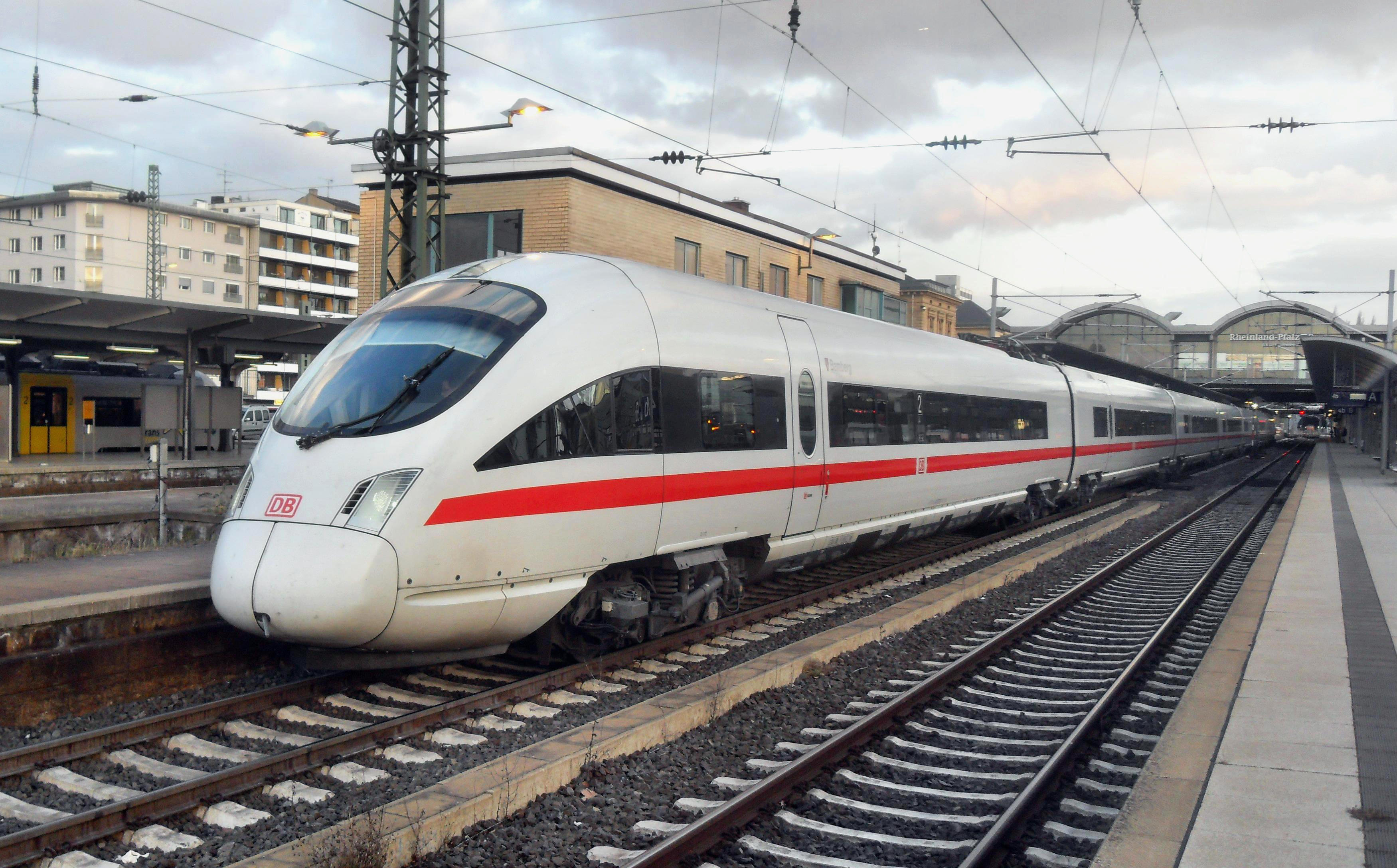 ICE T (2. Bauserie) im Mainzer Hauptbahnhof auf dem Weg nach Dortmund